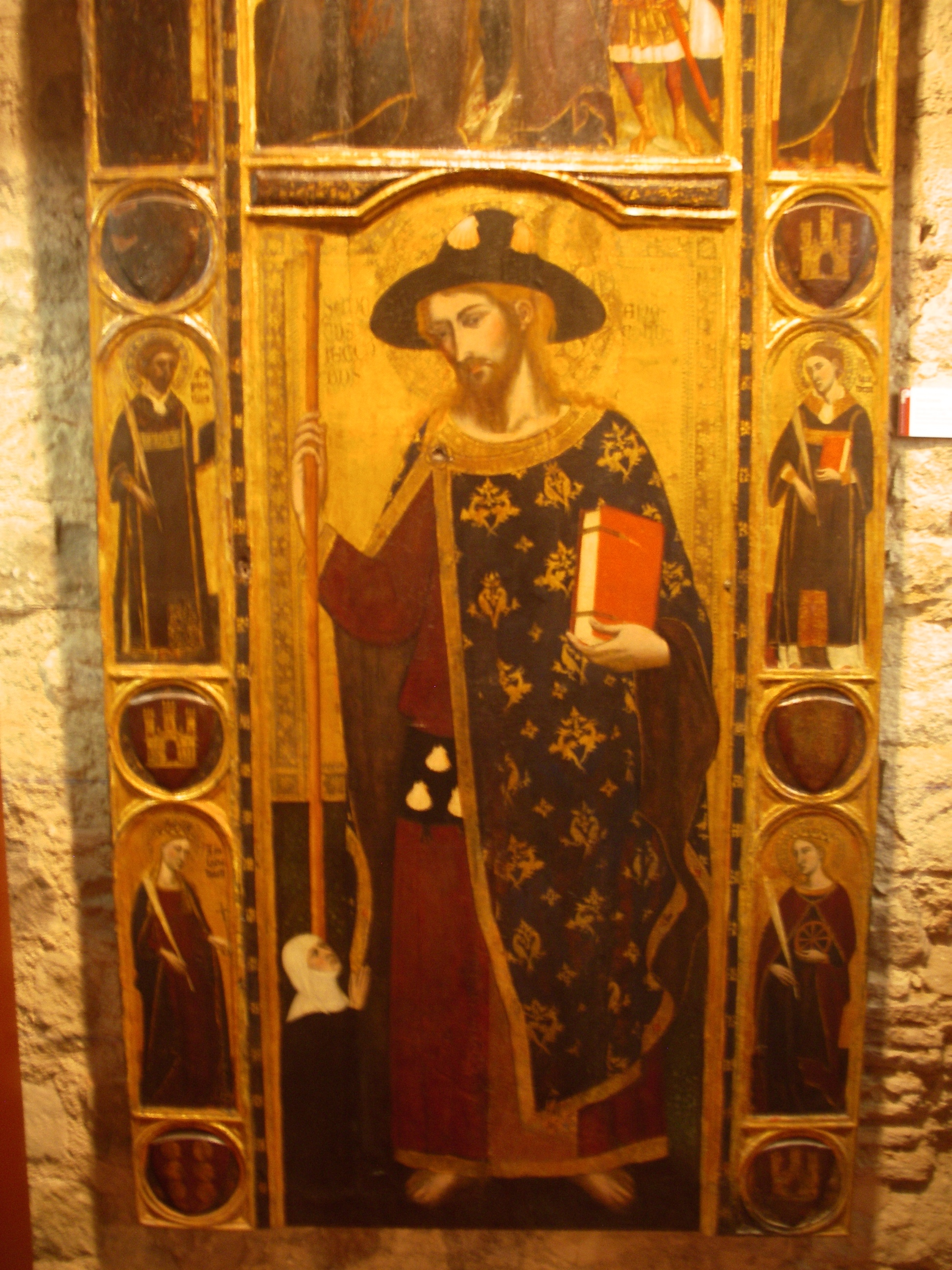 Retaule de Sant Jaume, obra de 1347 de Ferrer Bassa, procedent del Monestir de Jonqueres, a Barcelona. Actualment al Museu Diocesà de Barcelona